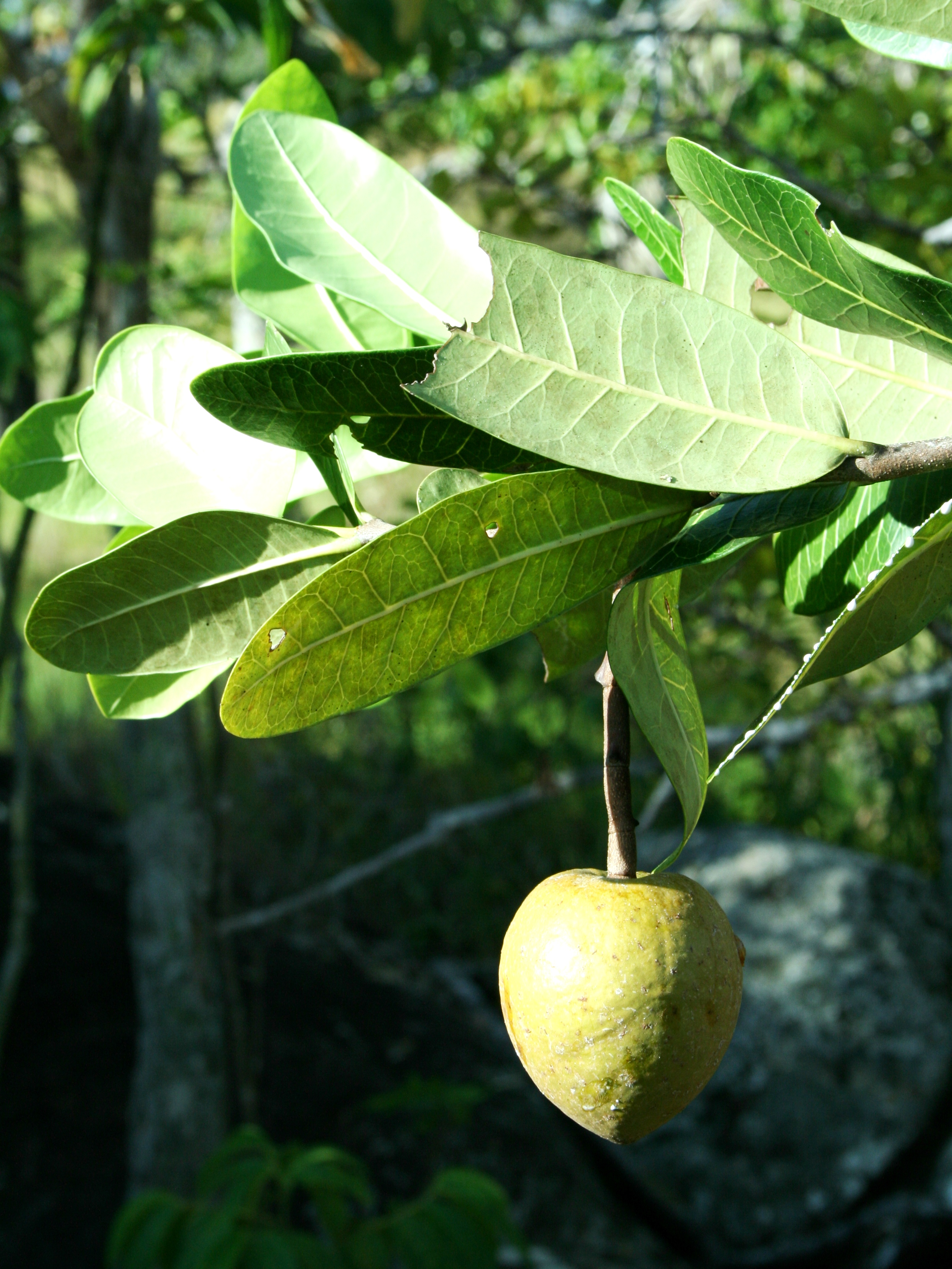 Parahancornia surrogata, Cacuri, Venezuela